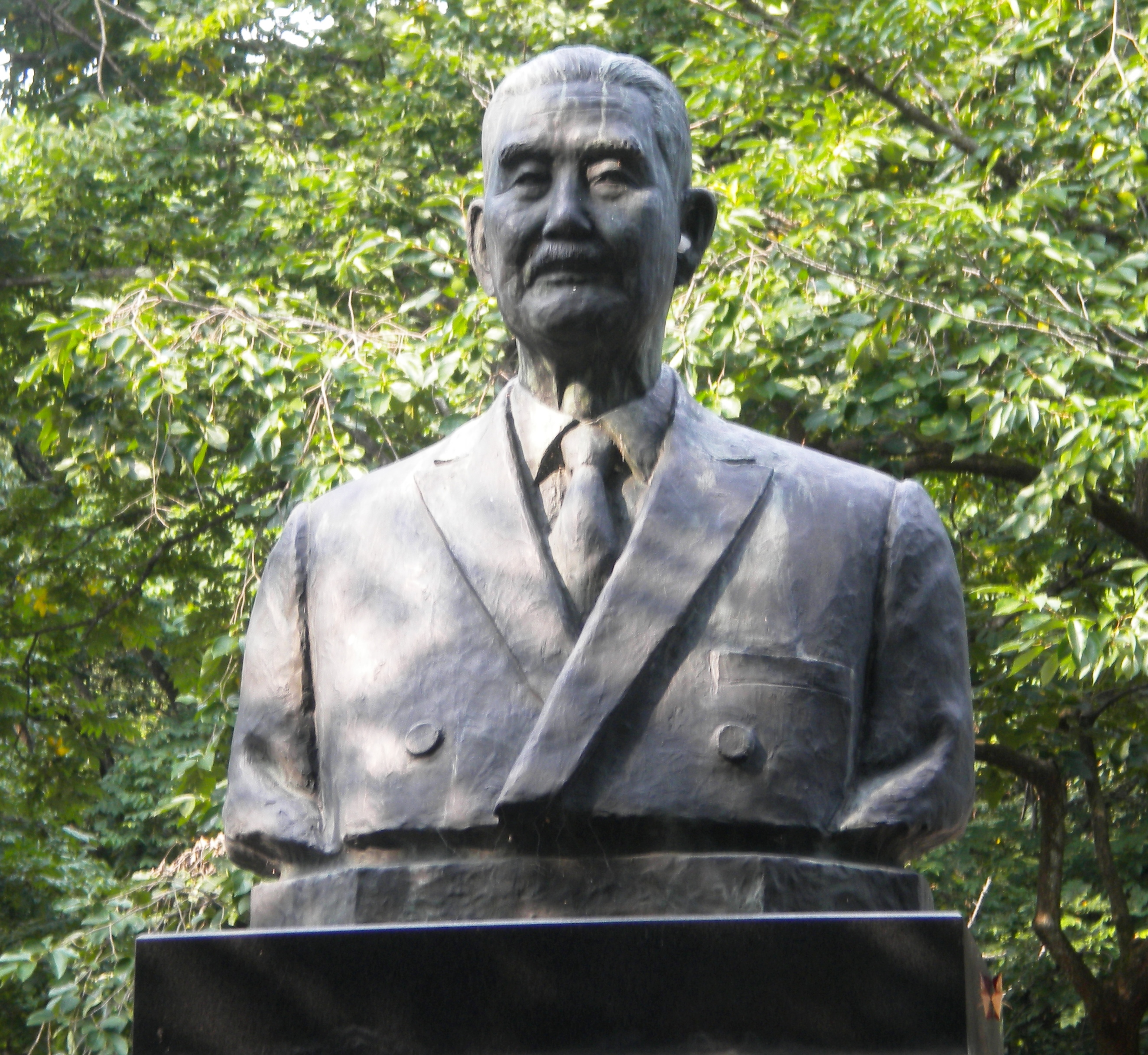 Portrait bust of Wada Shin at Zenryuji